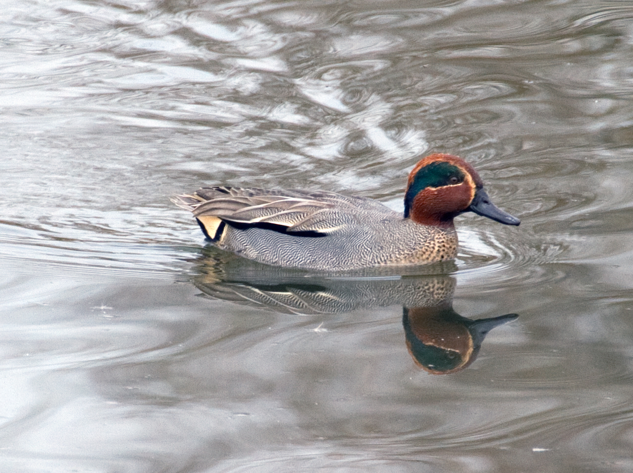 Teal